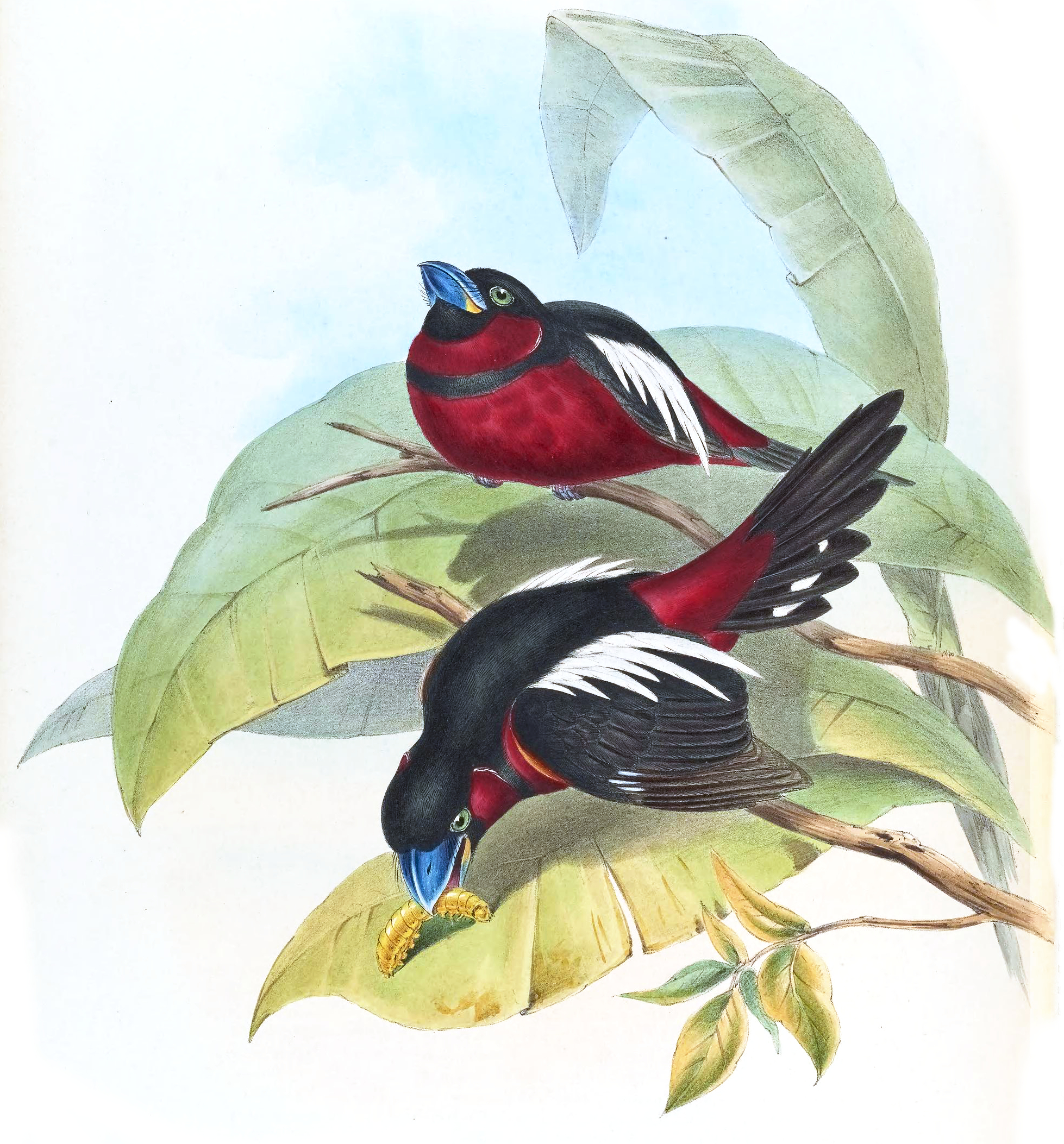 Cymbirhynchus macrorhynchus